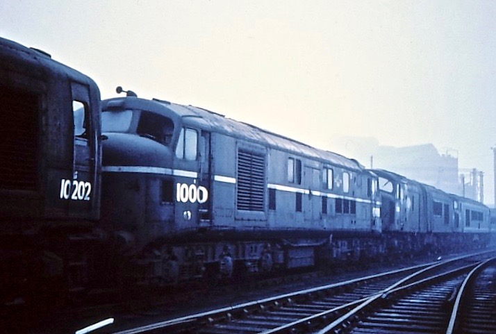 LMS 10000 at Derby